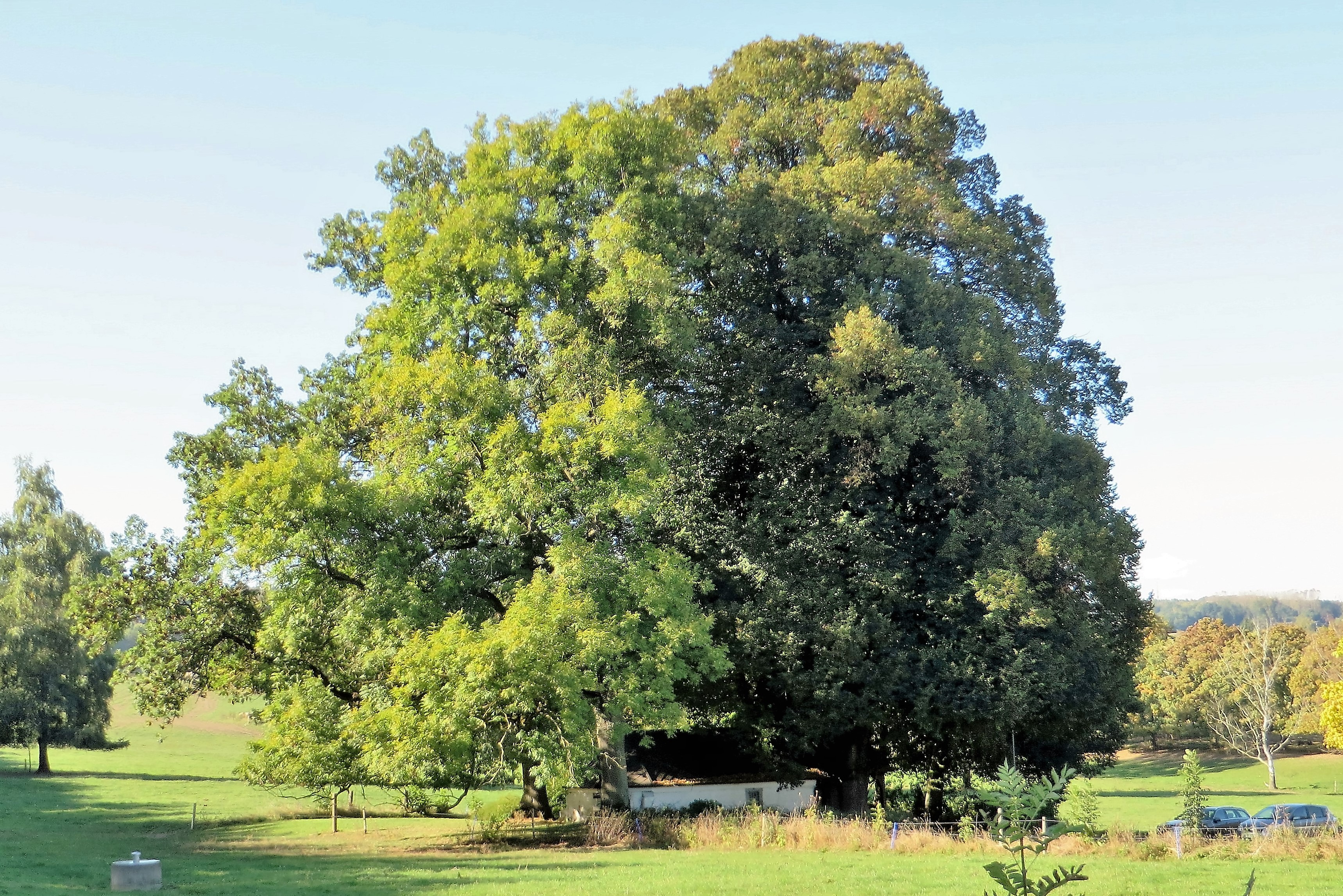 Die zwei 1863/64 gepflanzten Sommerlinden bei der Kapelle am „Heilborn“, Naturdenkmal (ND 7143-515) in Dernbach